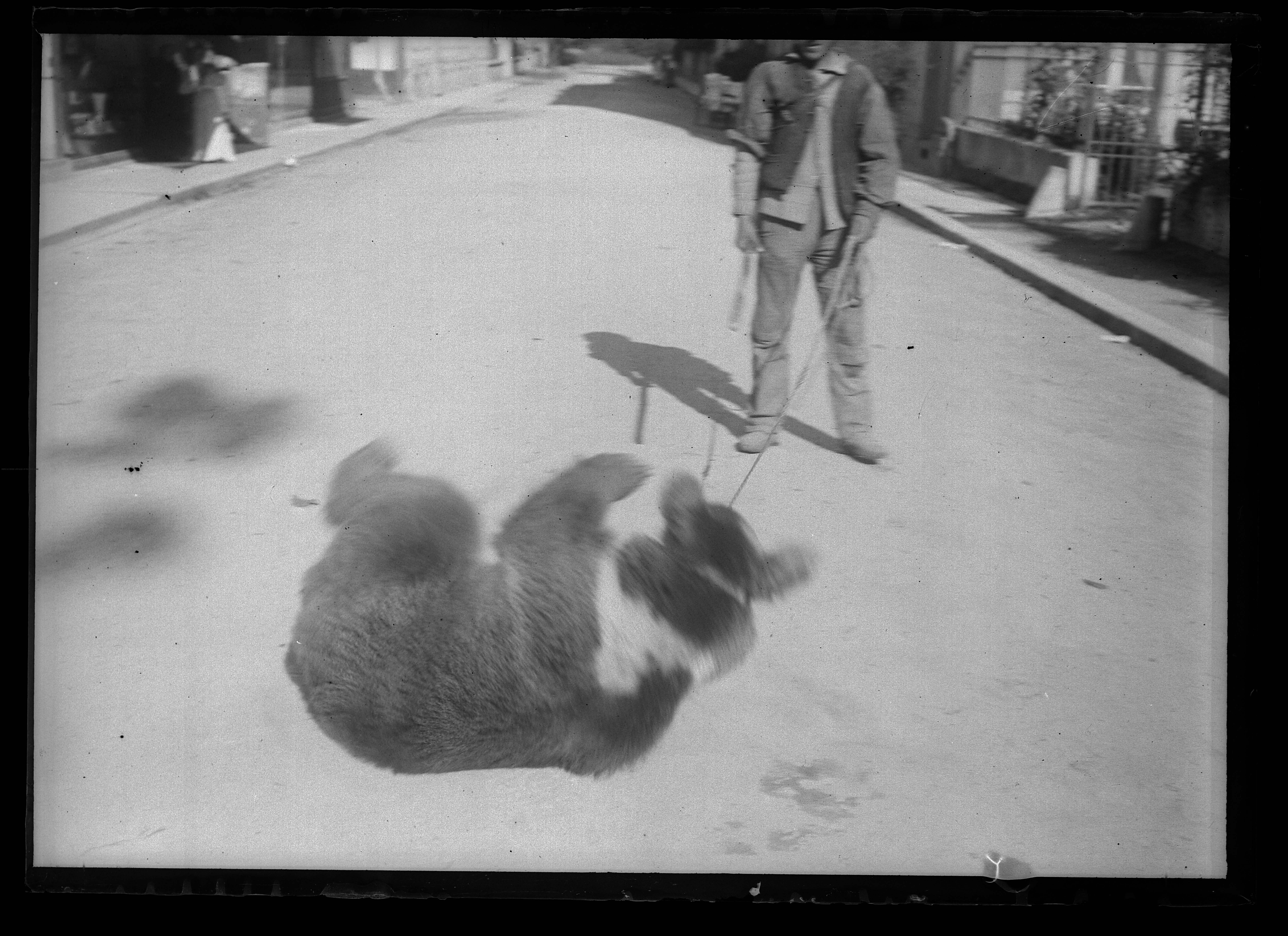 plaque négative au gélatino-bromure d'argent, format 6,5x9 cm. Inscription manuscrite par Eugène Trutat sur l'enveloppe : "15 septembre 1895 Luchon Ours faisant la cabriole"